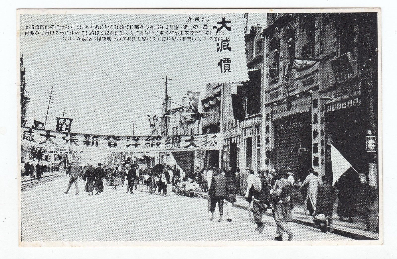 江西南昌街市